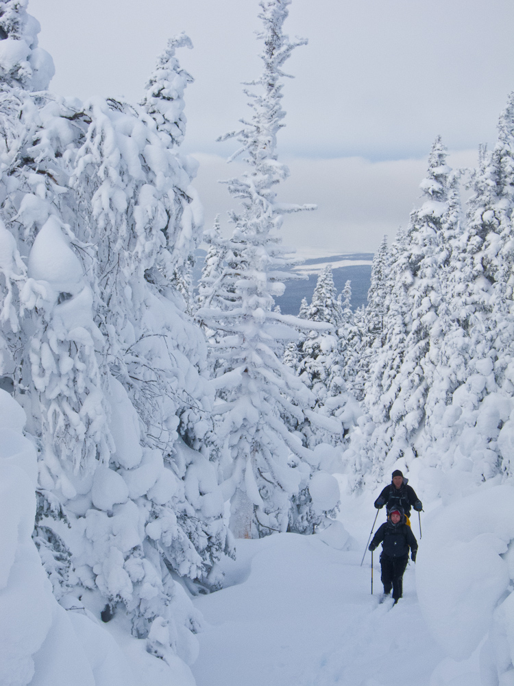 Ski de montagne dans les Chic-Chocs